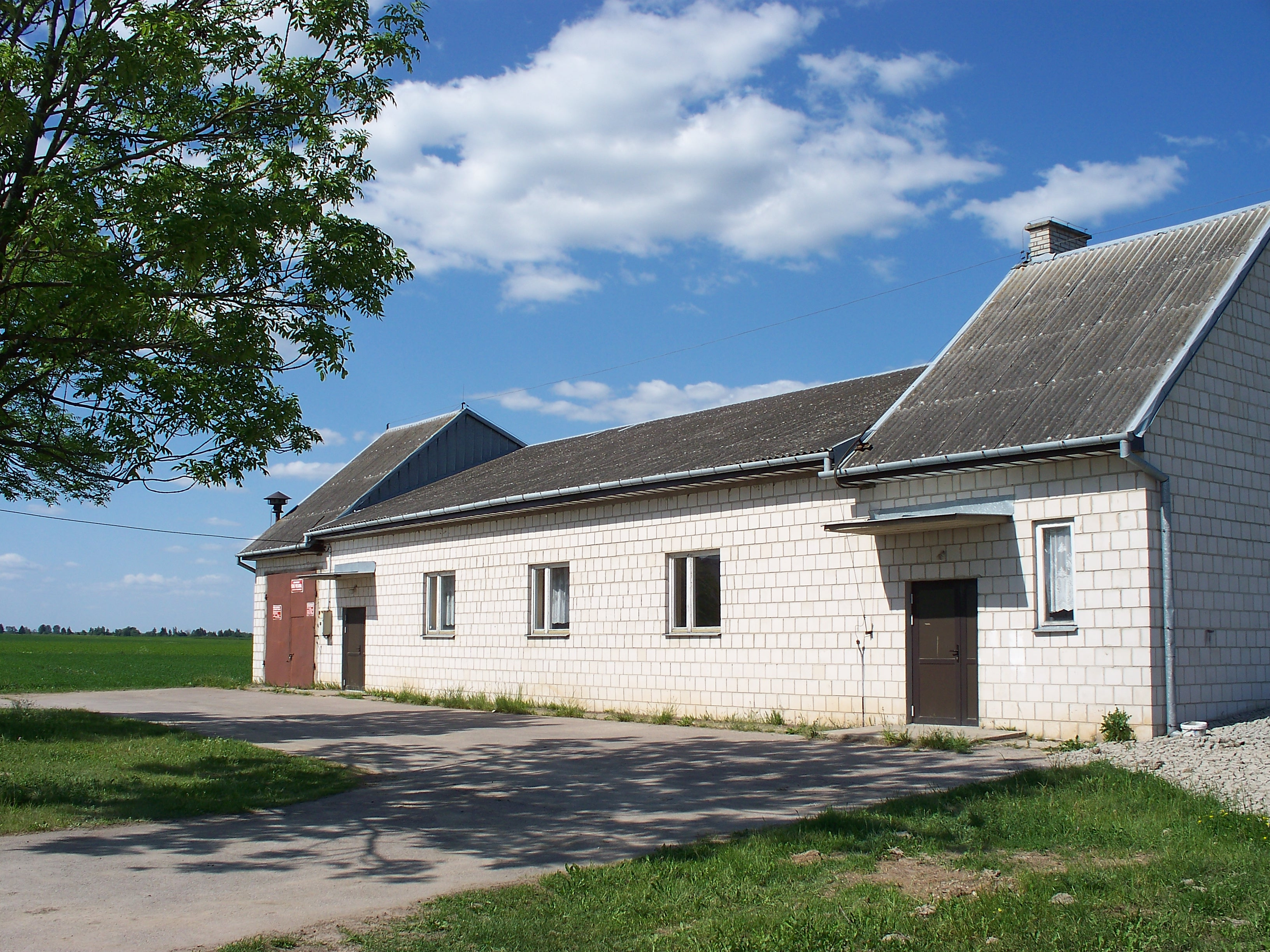 Naprzeciwko budynku straży znajduje się staw.